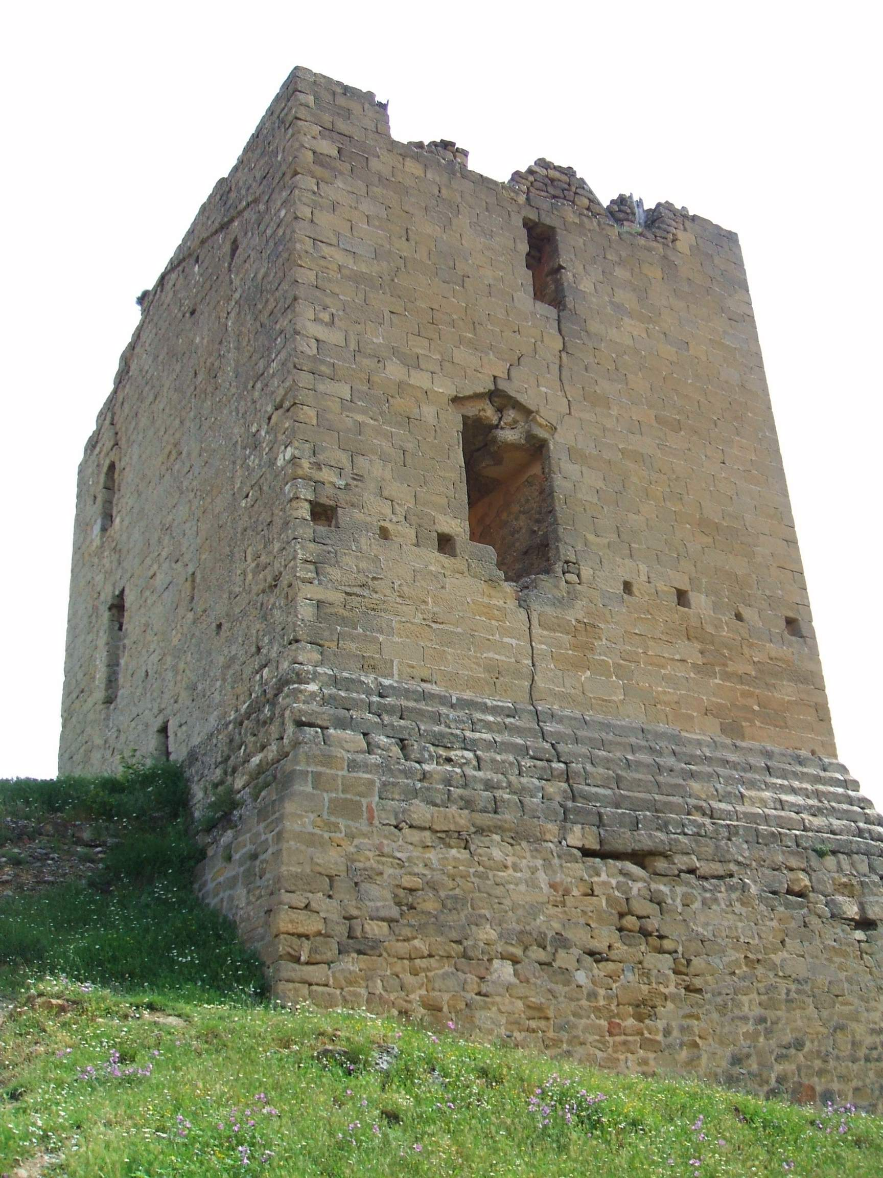 San Vicente de la Sonsierra (La Rioja, España) - Castillo